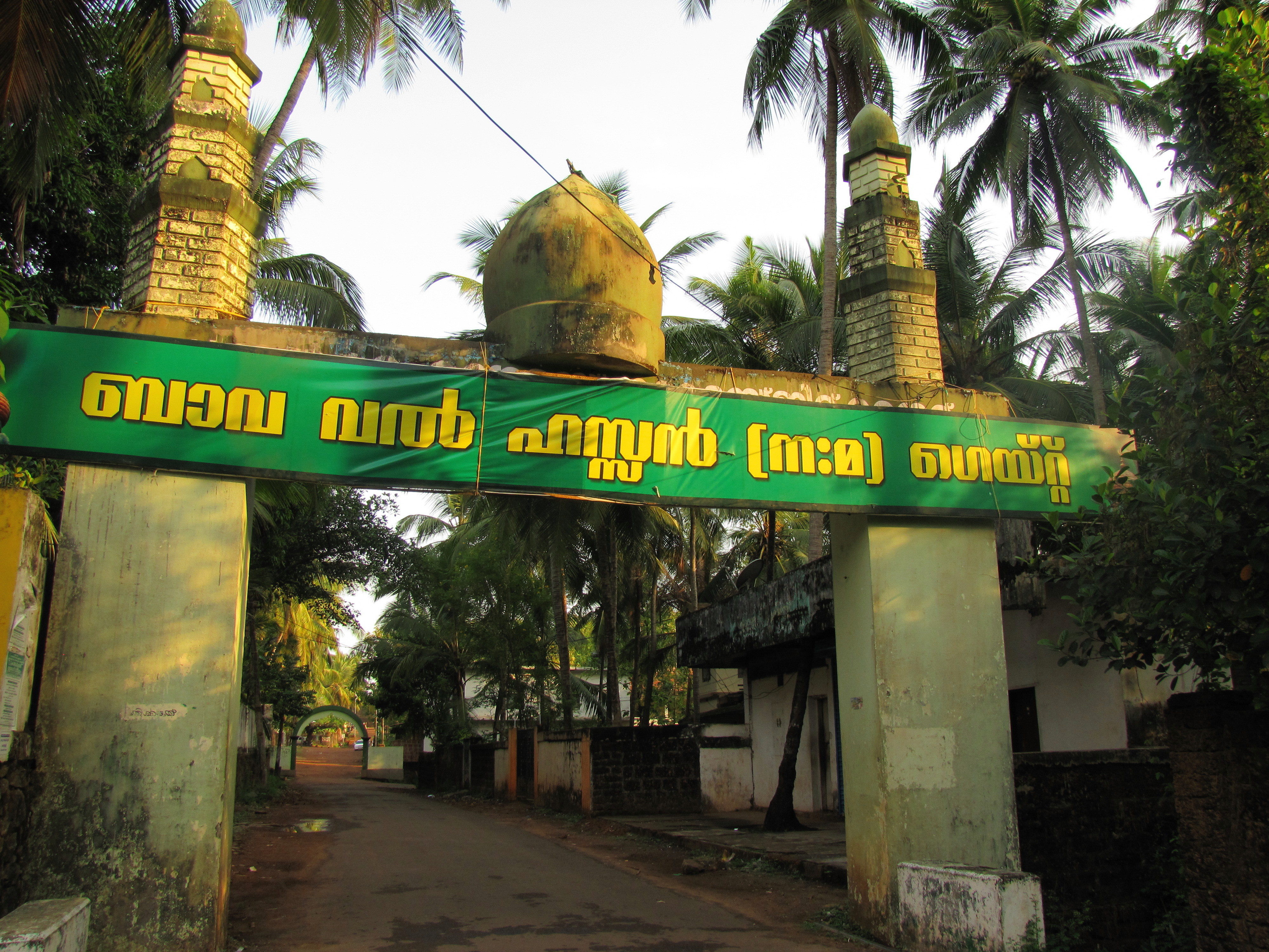 Bava Val Hassan Nama Gate, Bekal, Kasaragod